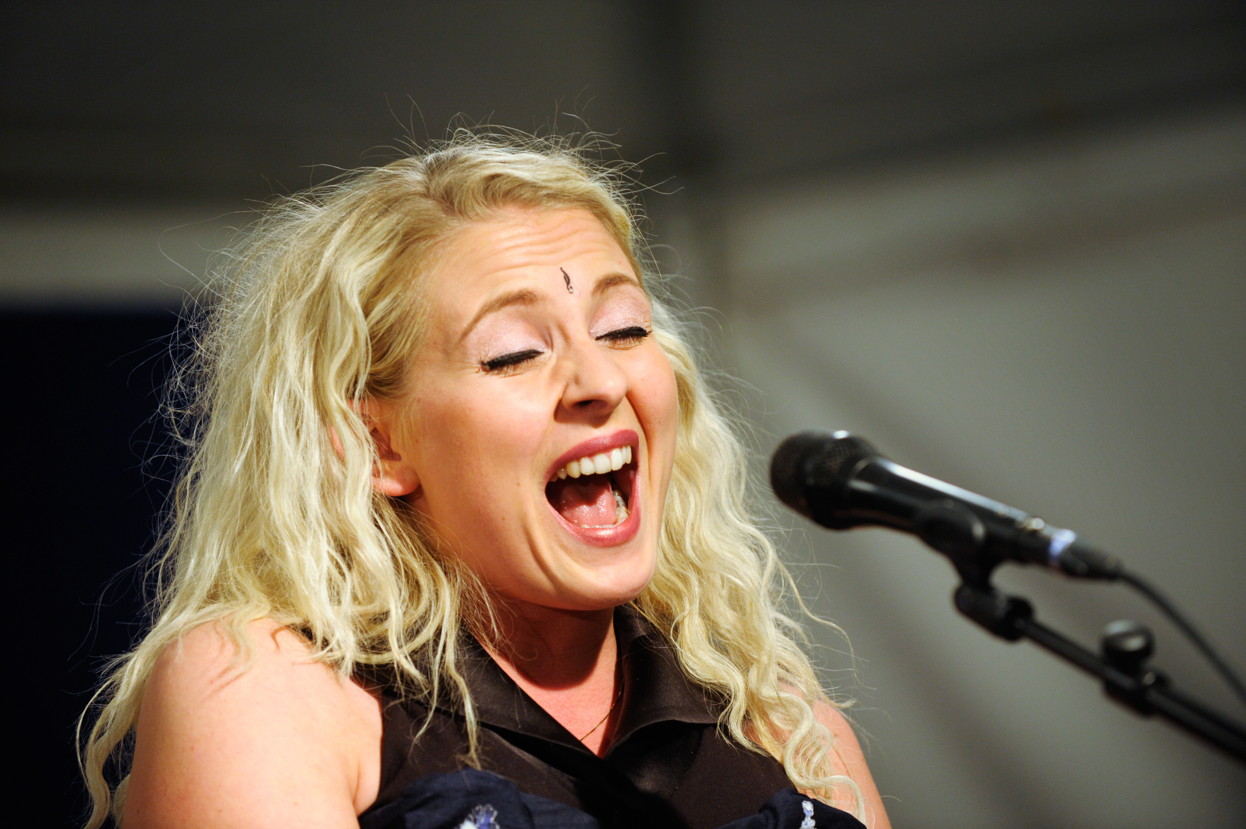 Eivør Pálsdóttir sjunger på kulturnatten 2008-10-10